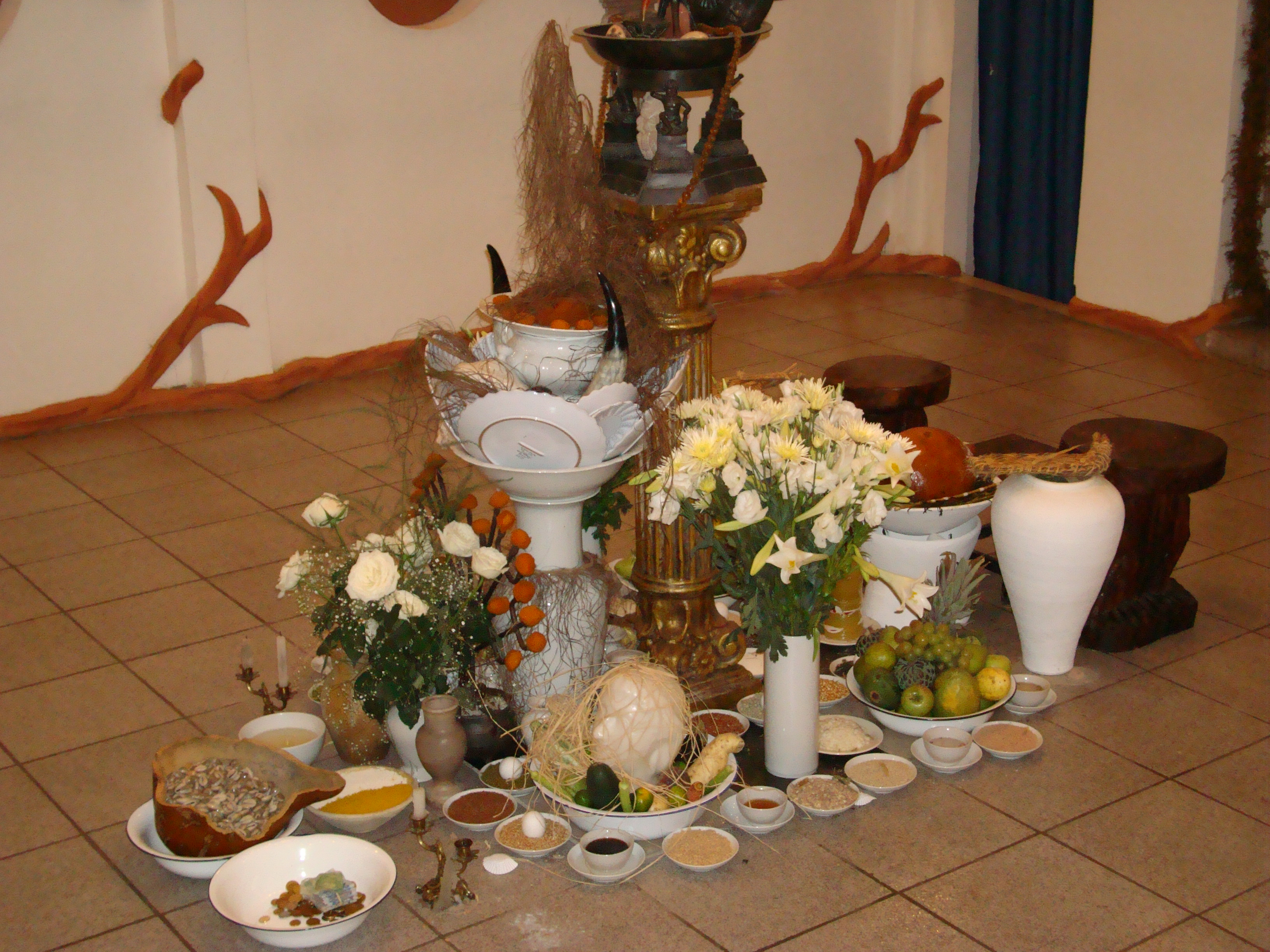 Ritual de Axexe, Candomblé, Salvador, Bahia